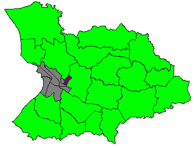 Comunidad Balboa, ubicada en el Barrio Río (Mayagüez Urbano) de Mayagüez, Puerto Rico.